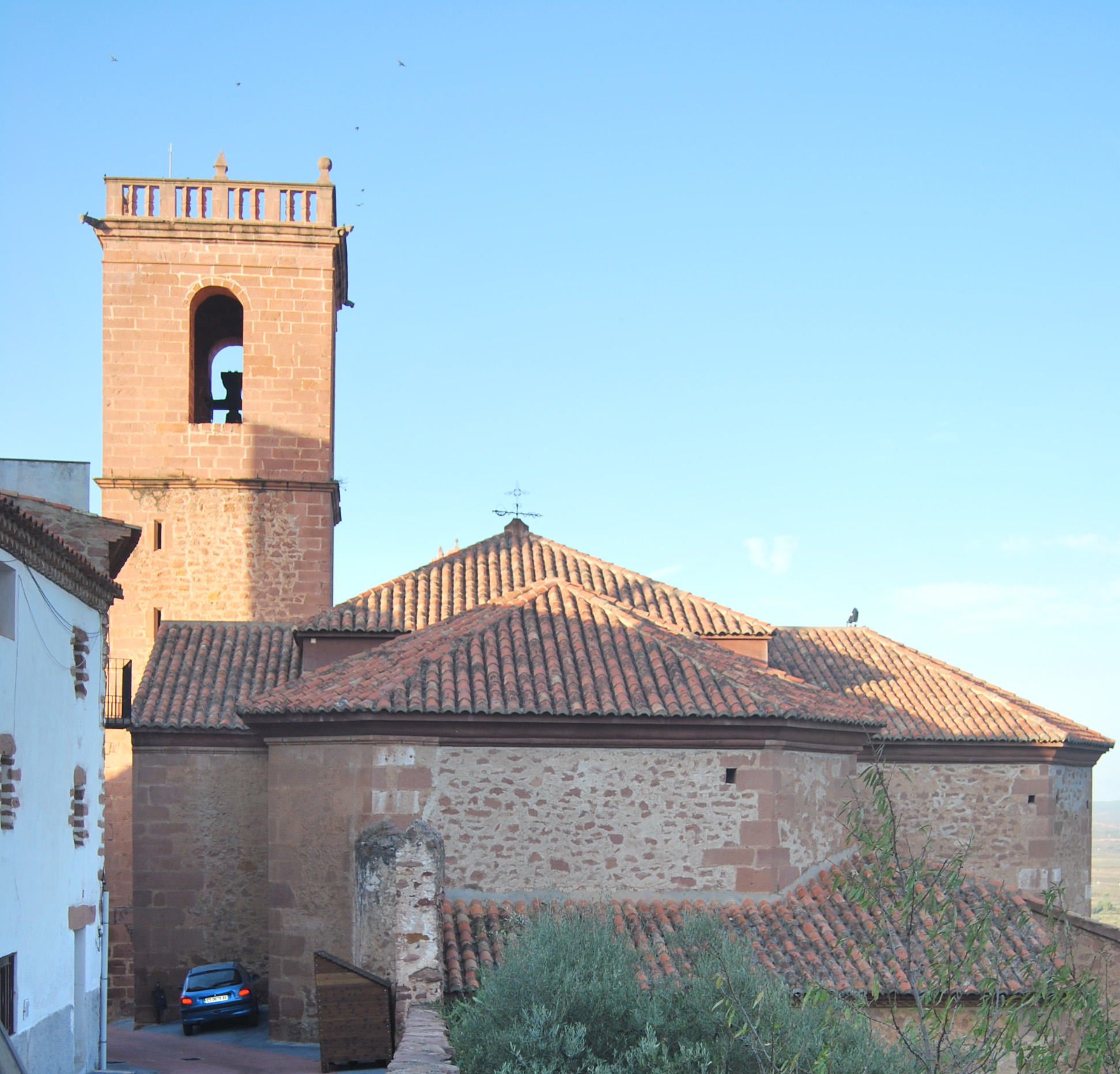 Església de l'Assumpció, Vilafamés 05.128-004.